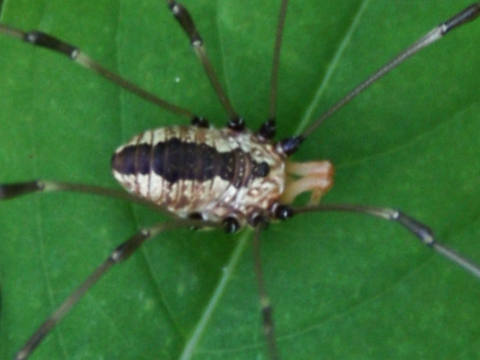 Harvestmen (Leiobunum vittatum) taken in Portage, MI.